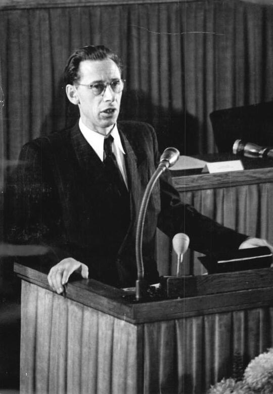 Illus/Quaschinsky 1.11.51 13. und 14. Sitzung der Volkskammer Die Volkskammer der DDR trat am 31.10.51 und 1.11.51 zu ihrer 13. und 14. Sitzung zusammen, um u.a. über das "Gesetz über den Fünfjahresplan zur Entwicklung der Volkswirtschaft der Deutschen Demokratischen Republik", den Rechenschaftsbericht der Regierung über die Einnahmen der Republik und ihre Verwendung für das Rechnungsjahr 1950" und das "Gesetz über die Deutsche Notenbank" zu beraten. UBz: Kurt Viebig (VdgB) bei seiner Diskussionsrede."